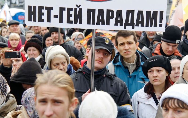 Протестующие против проведения гей-парада.